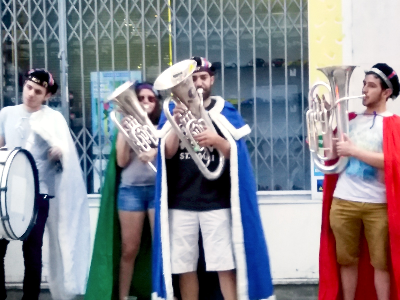 "Les Chiures de Mouche", orchestre de l'Ordre du Vénéré Bitard, à Poitiers.